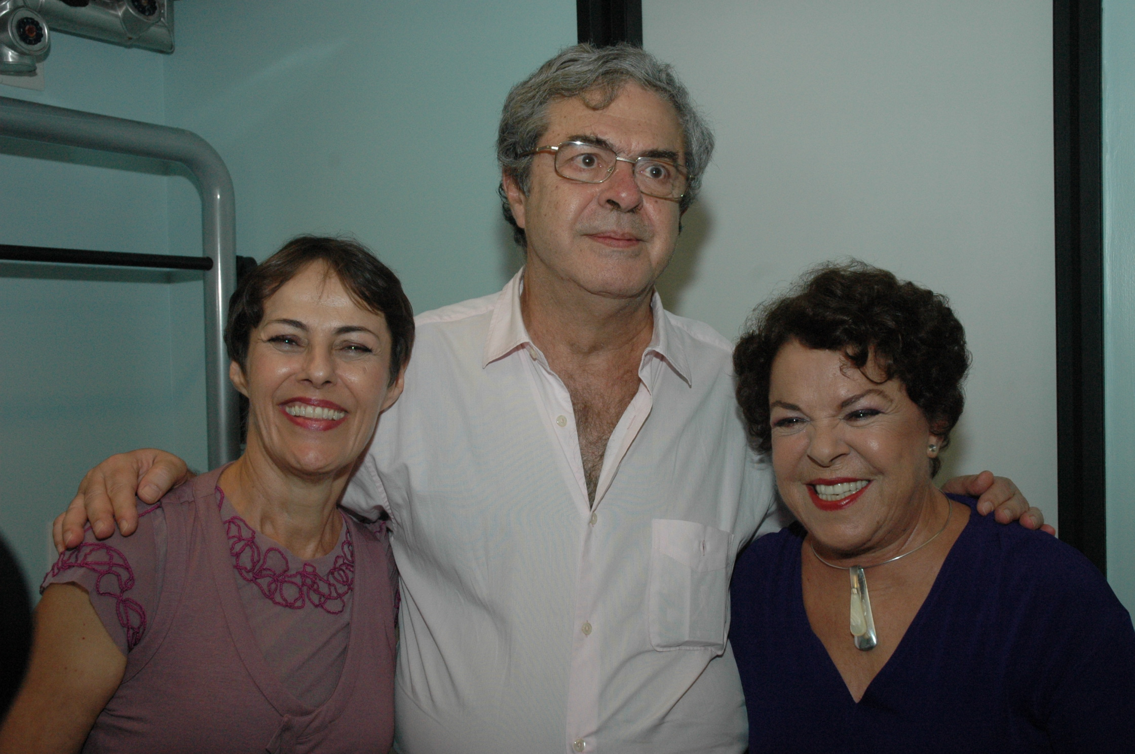 As irmãs Ana de Hollanda, ministra da Cultura, e a cantora Miúcha, na cerimônia de reabertura da Biblioteca Pública Municipal Mário de Andrade, nas comemorações do 457º aniversário da cidade de São Paulo. Foto: Marcos Fioravanti